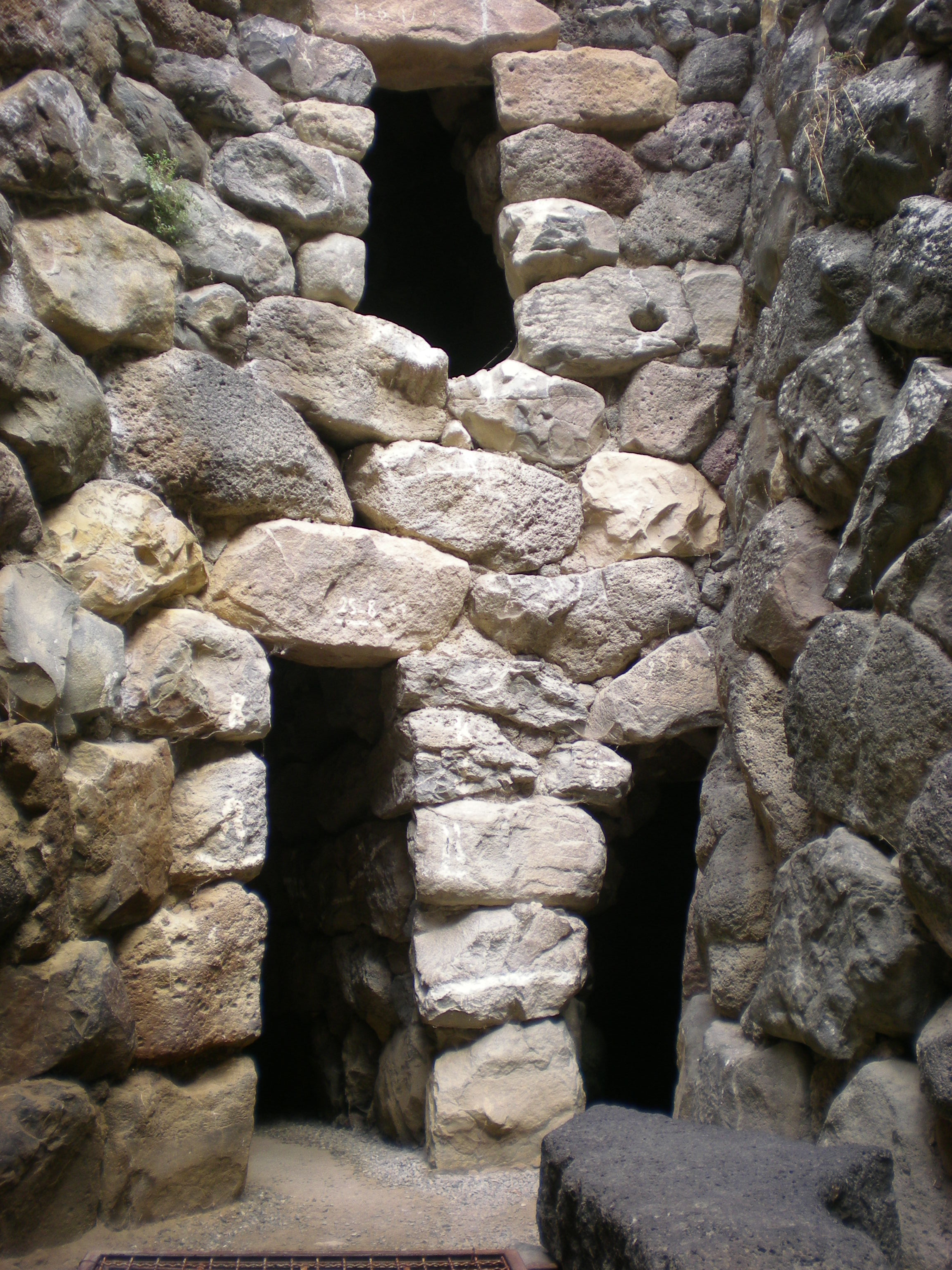 Complesso archeologico Su Nuraxi - MIBAC This is a photo of a monument which is part of cultural heritage of Italy.